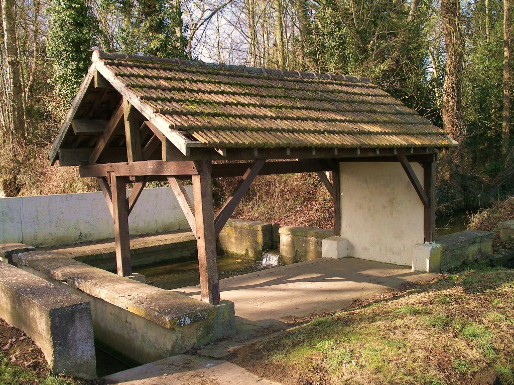 Lavoir de Sannerville (Calvados)